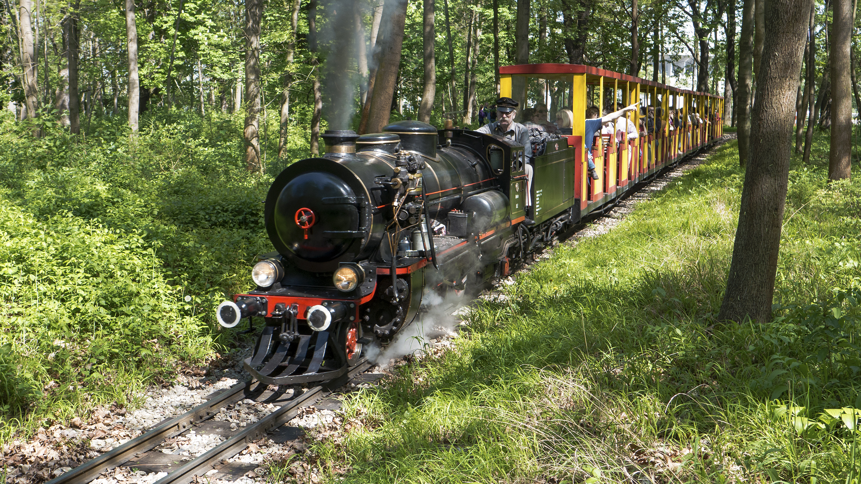 Liliputbahn im Wiener Prater in Wien 2, Strecke Rotunde–Stadion